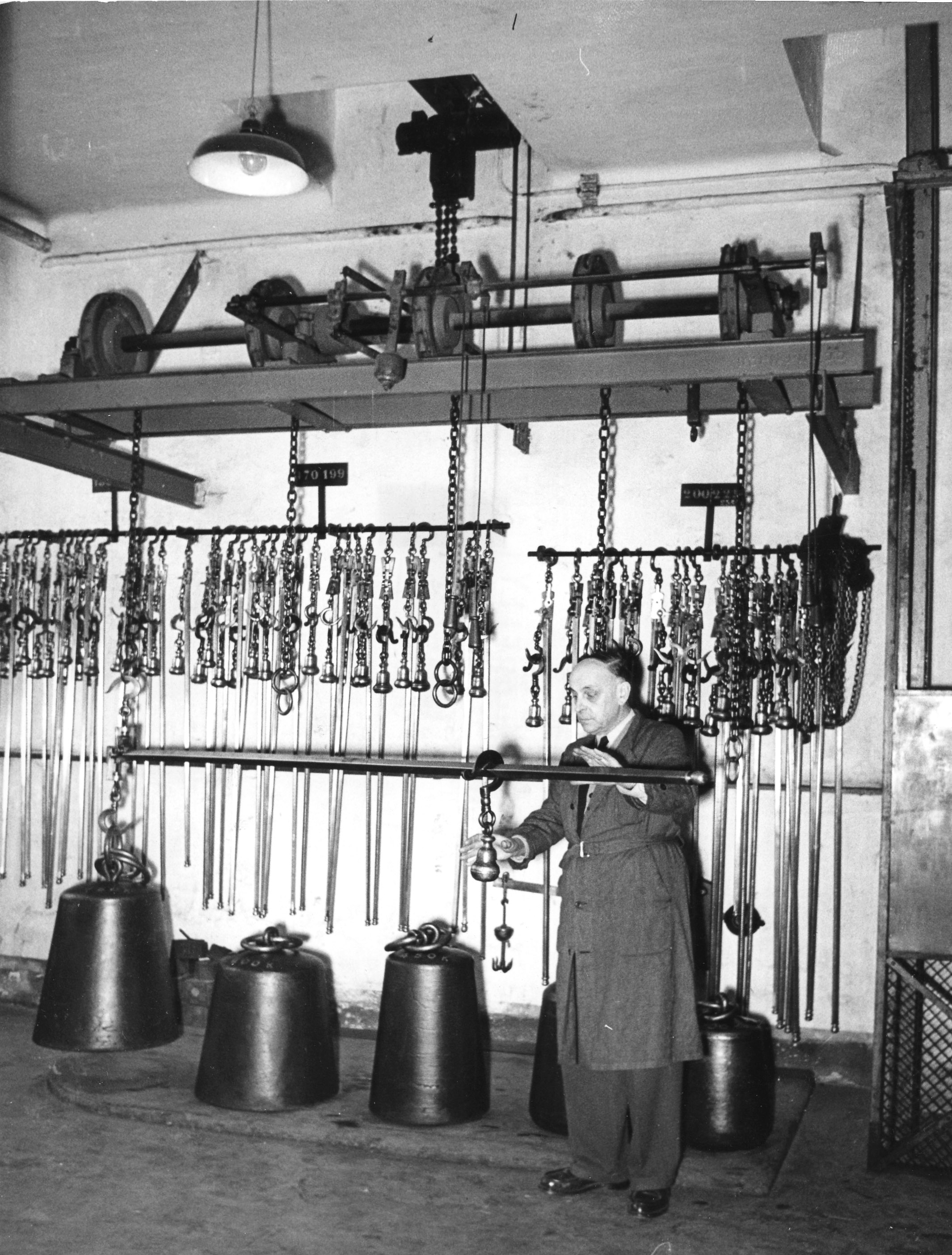 Monsieur Hilaire Grand en train de vérifier la justesse d'une balance romaine.